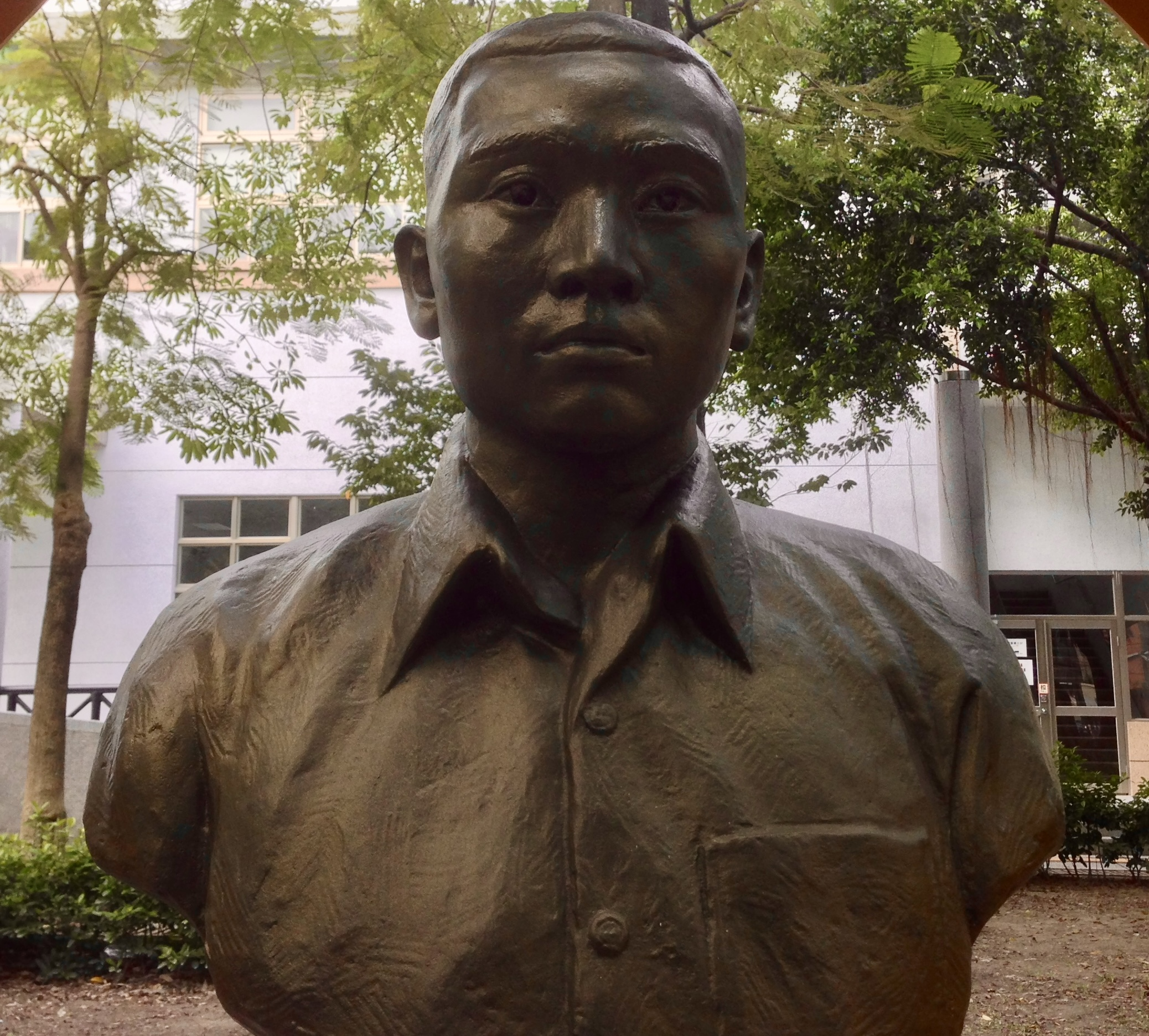 童宏勝銅像